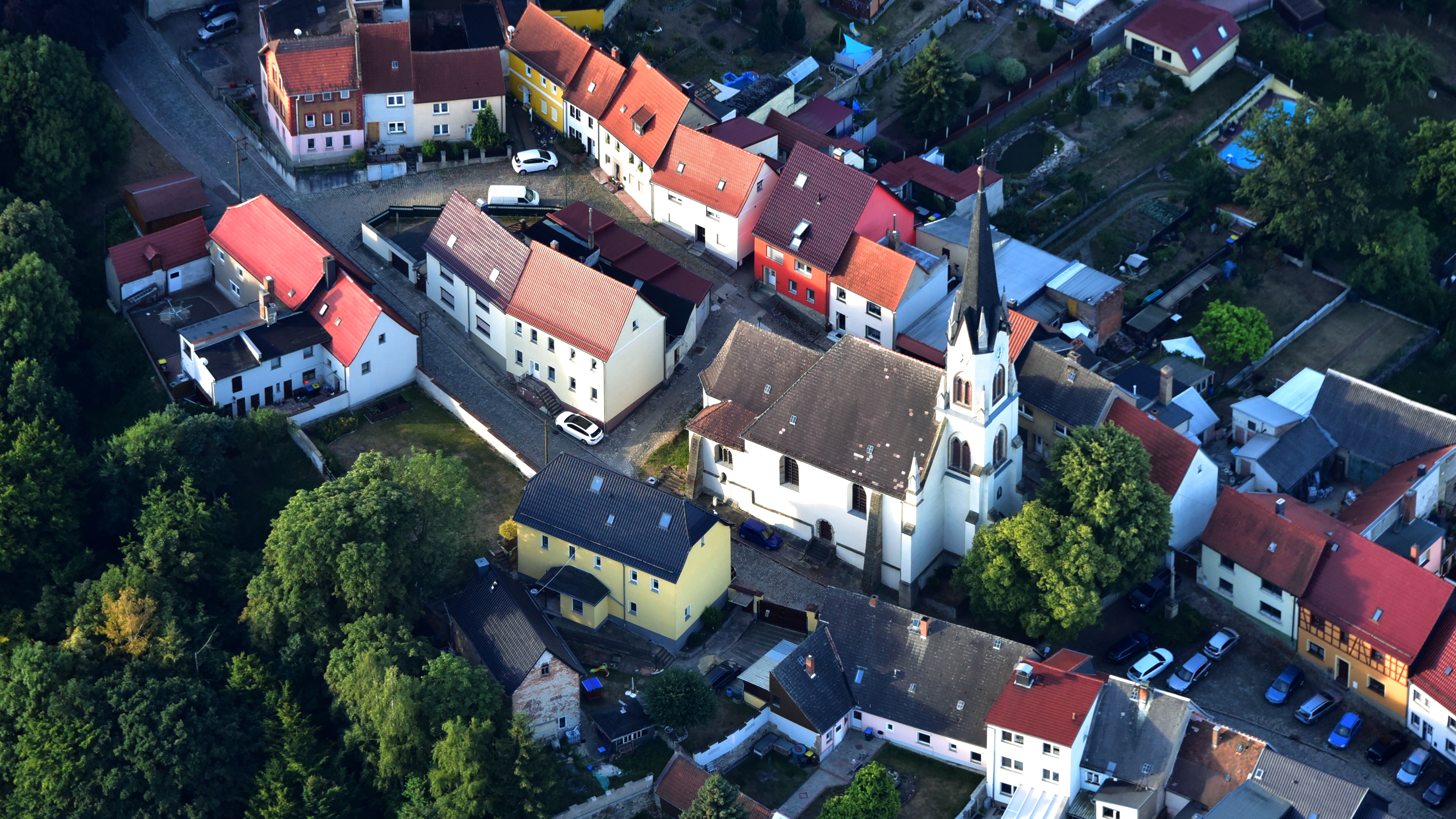 Osterfeld (Sachsen-Anhalt), Lutherkirche, Luftaufnahme (2018)